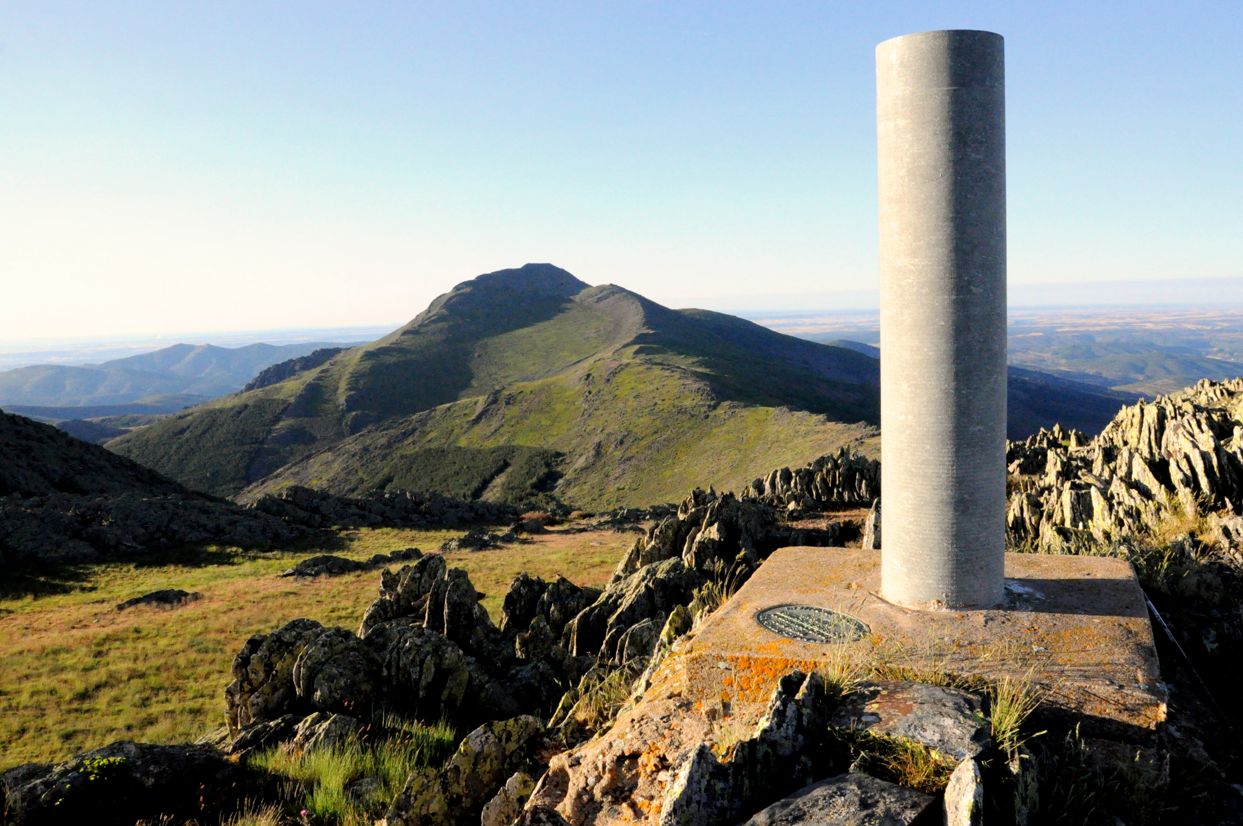 Campachuelo con el Ocejón al fondo